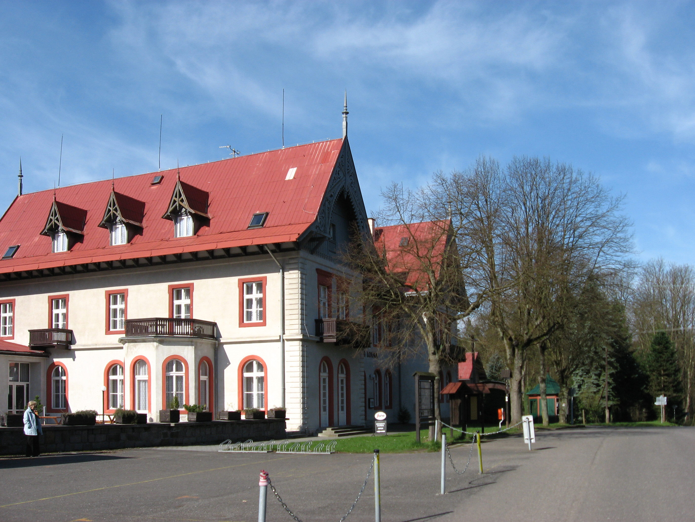 Hřensko, Mezná čp. 71, Mezní Louka, hotel.